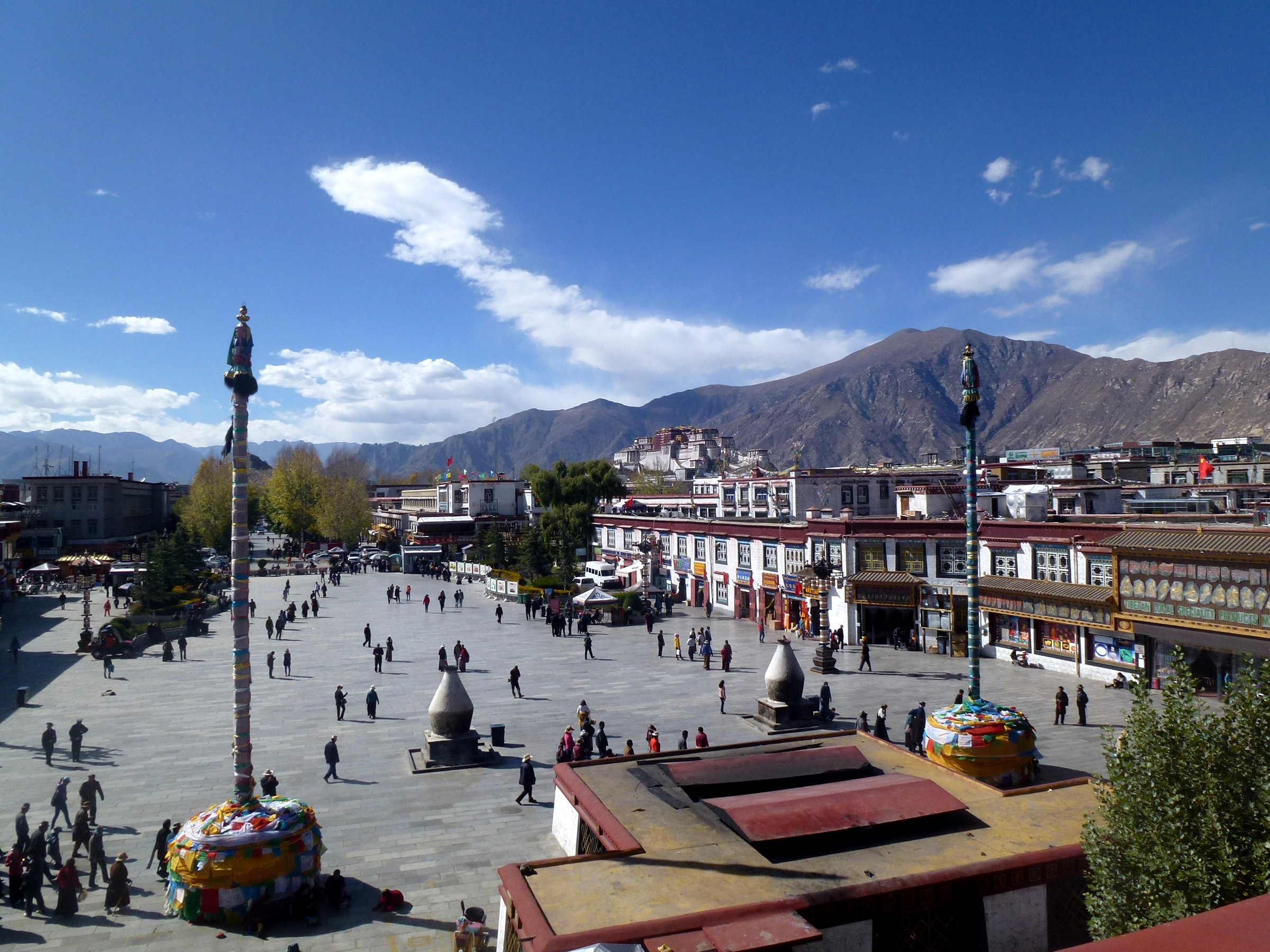 Jokhang Temple Lhasa Tibet China 西藏 拉萨 大昭寺